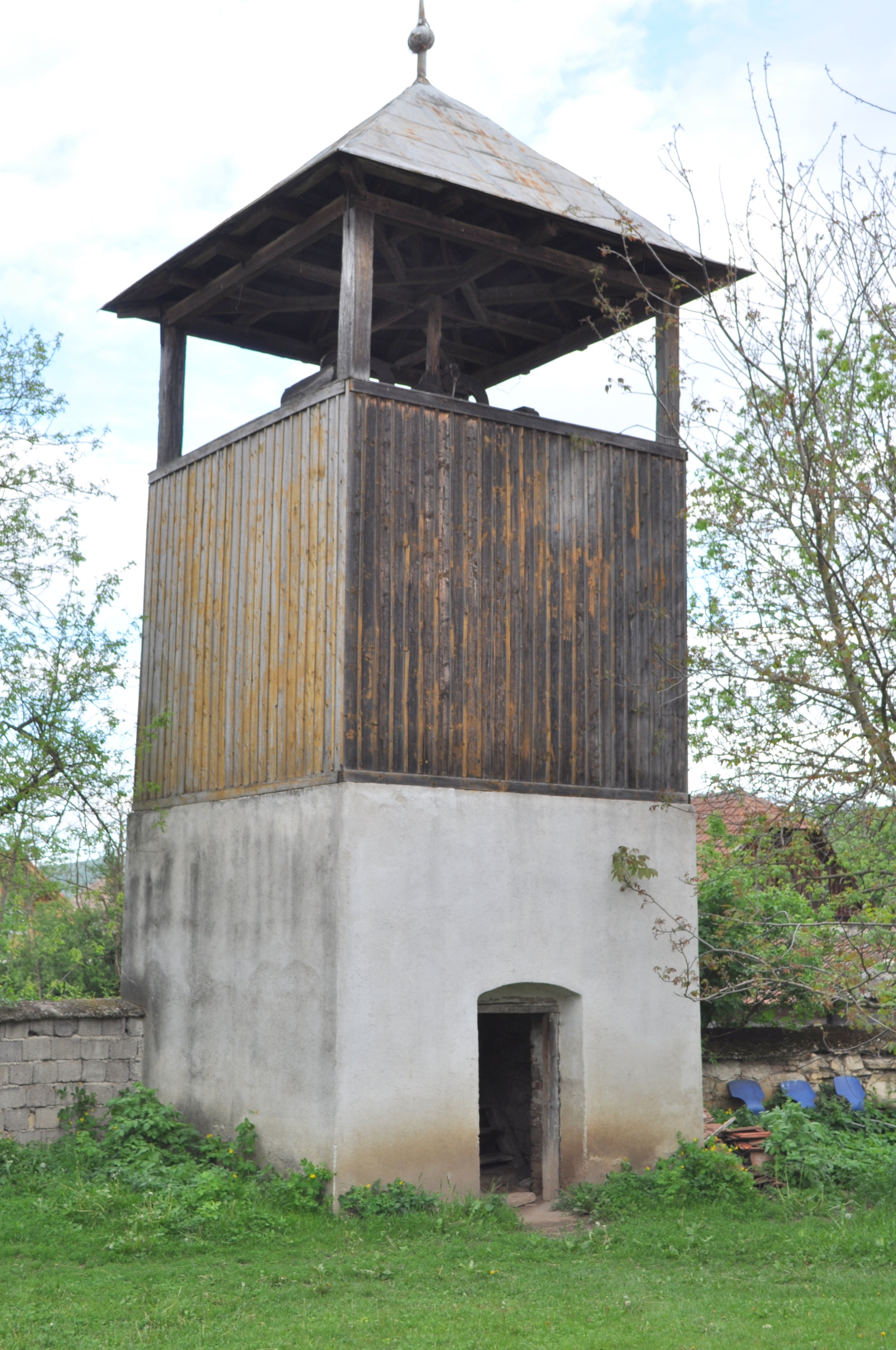 Clopotniță de lemn a bisericii reformate, sat Bonțida; comuna Bonțida 02